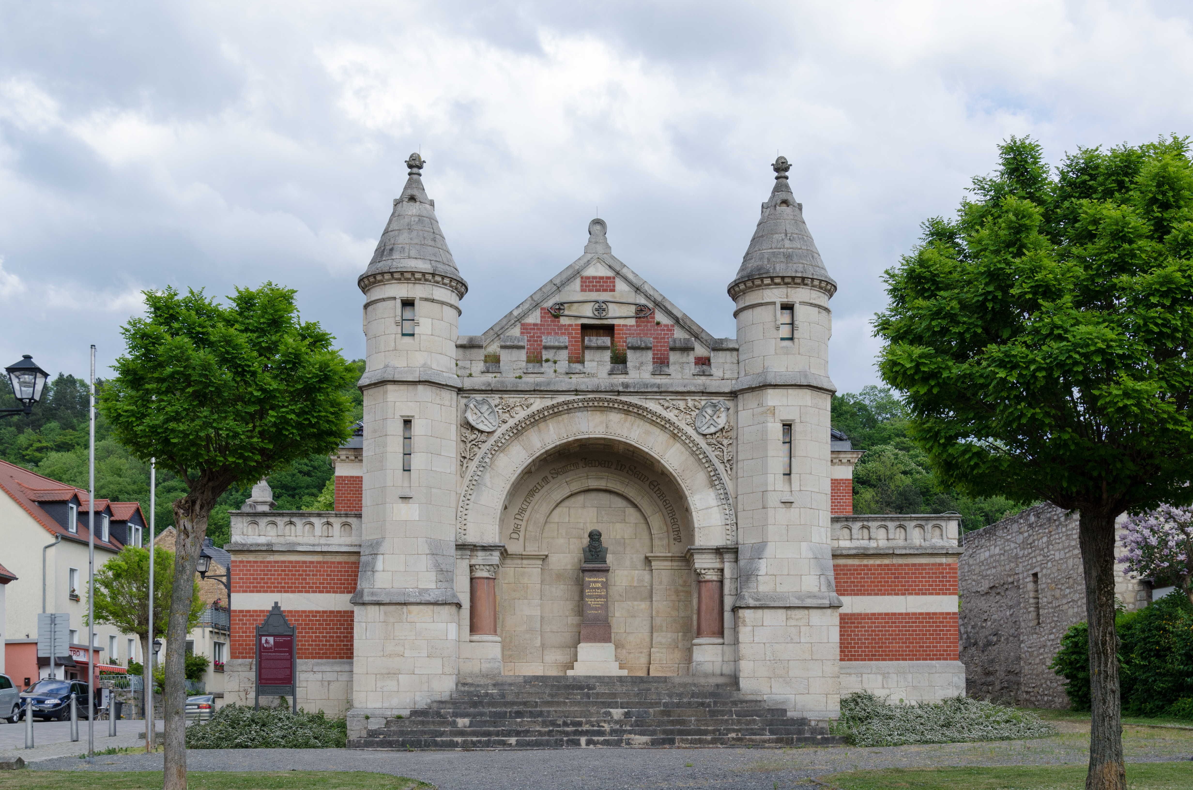 Freyburg an der Unstrut, Oberstraße 9, Turnhalle